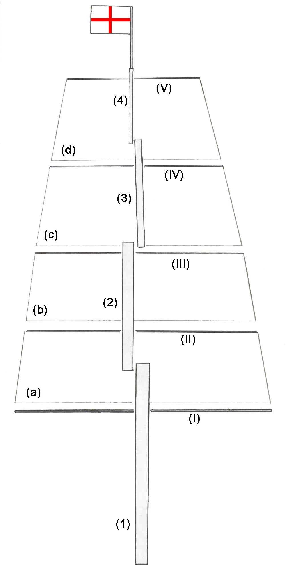 Autore: Emiliano Deghenghi Creata dall'utente per la realizzazione di questa voce